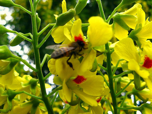 pau brasil